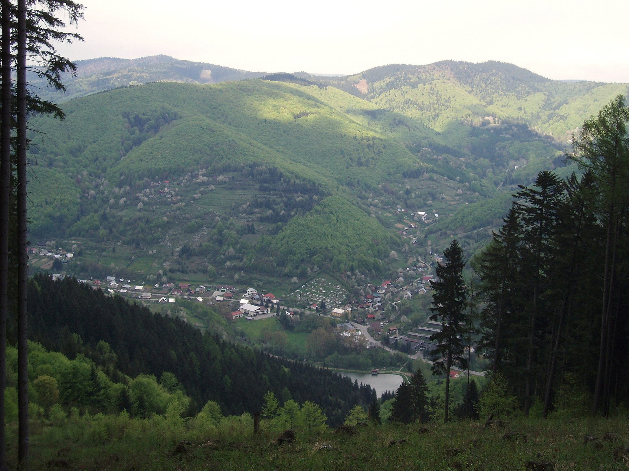 Pohľad na Modlatín v lete